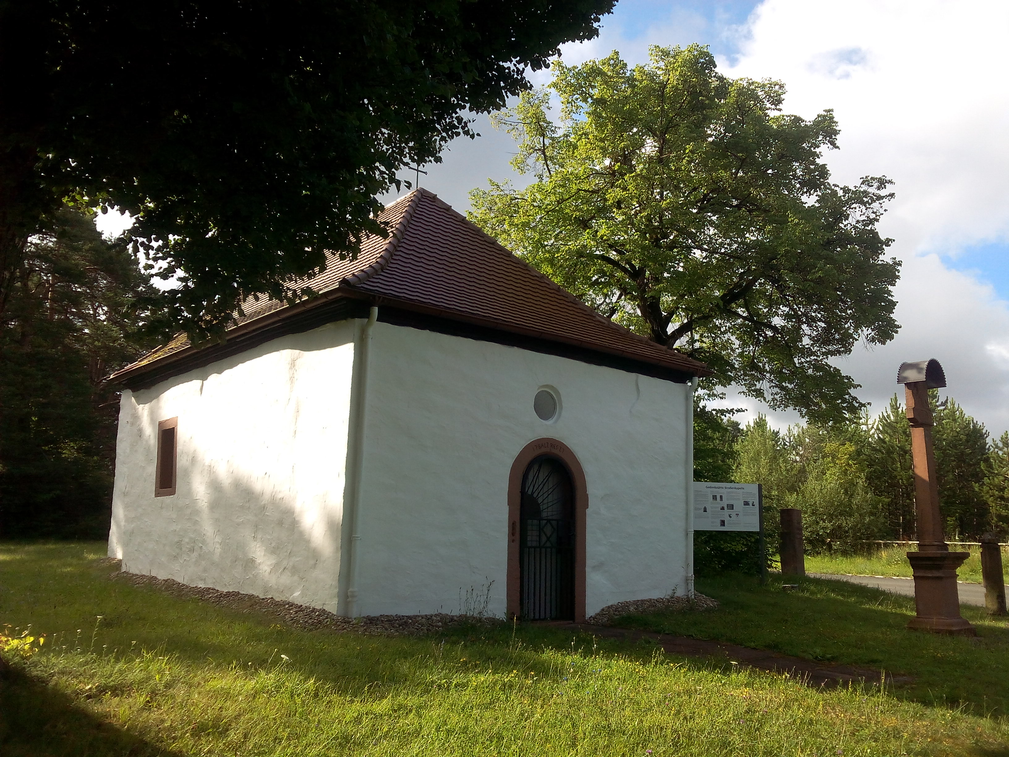 Eingang